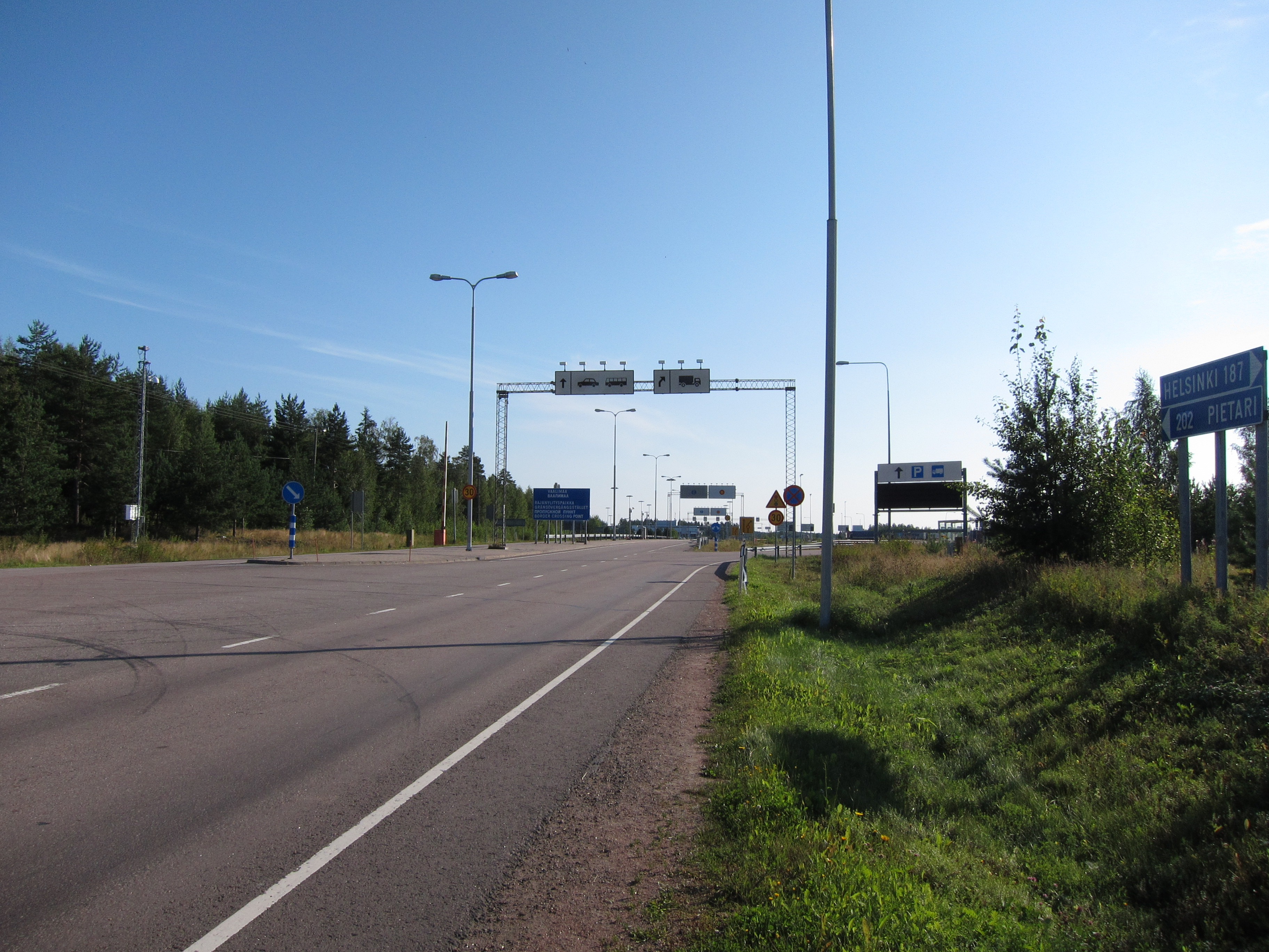 Vaalimaan rajanylityspaikka Virolahden kunnassa Suomessa Suomen ja Venäjän välillä.